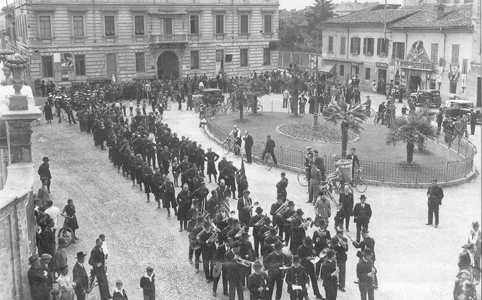 Immagine d'epoca della piazza Vittorio Emanuele II a Busto Arsizio